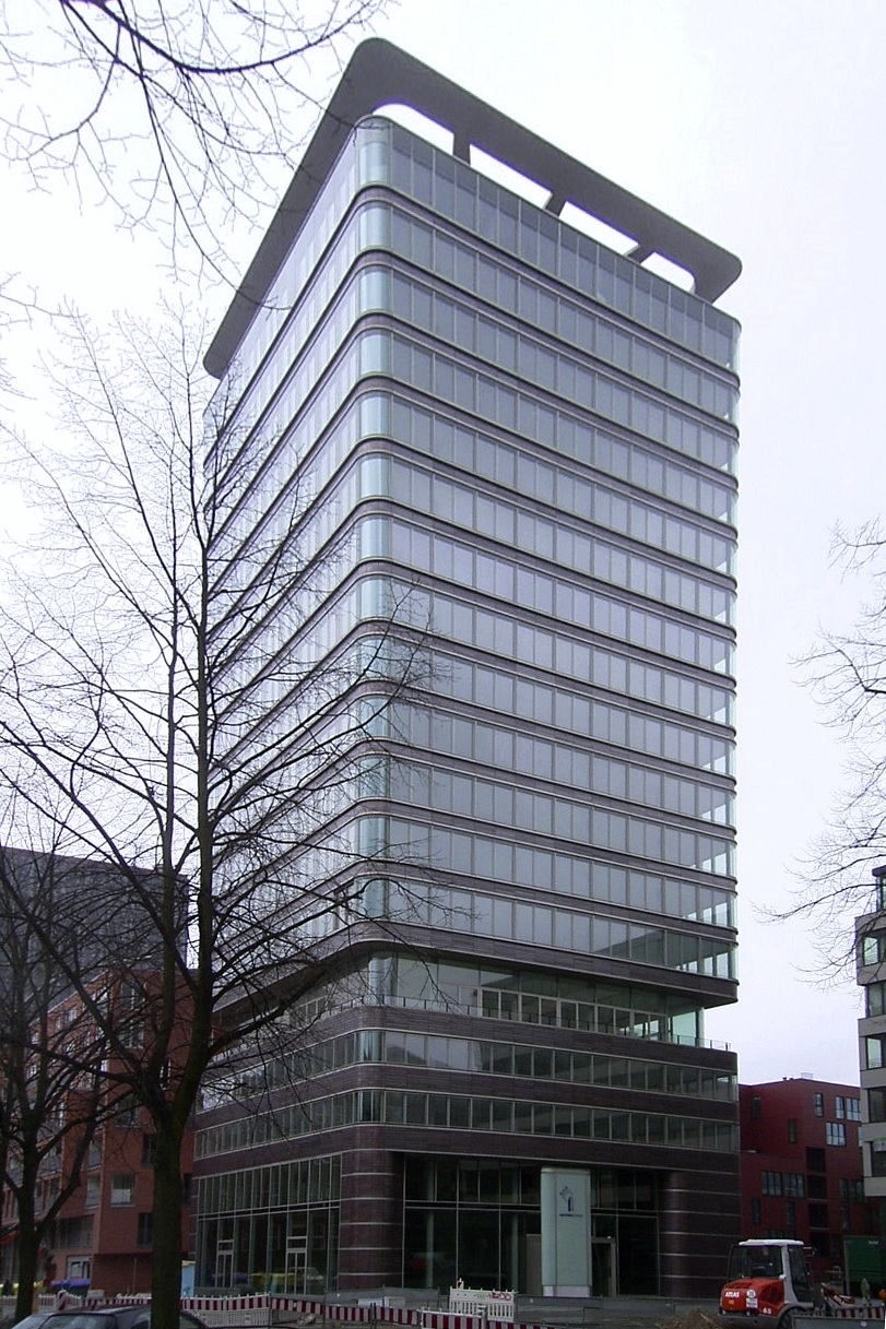 Der Astra-Turm in der Bernhard-Nocht-Straße in St. Pauli steht an der Stelle, an der früher das turmartige Verwaltungsgebäude der Bavaria-St.Pauli-Brauerei stand.